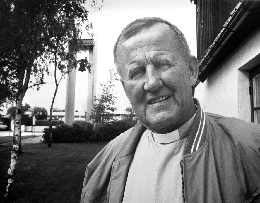 Ingemar Simonsson utanför Hyllie Kyrka i Malmö 26 aug 1992.